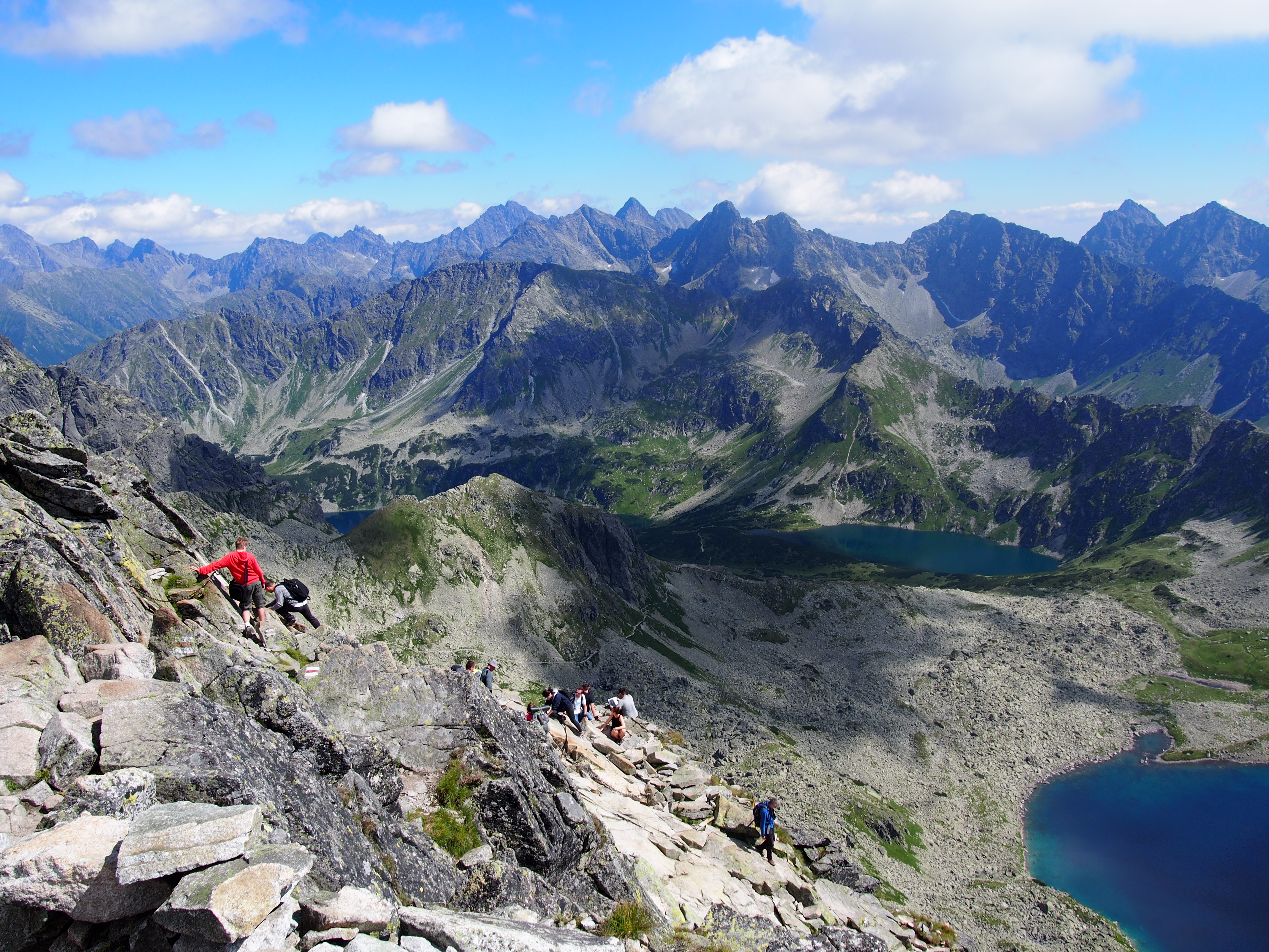 Zdjęcie zrobione na szczycie świnicy w stronę granicy polsko-słowackiej